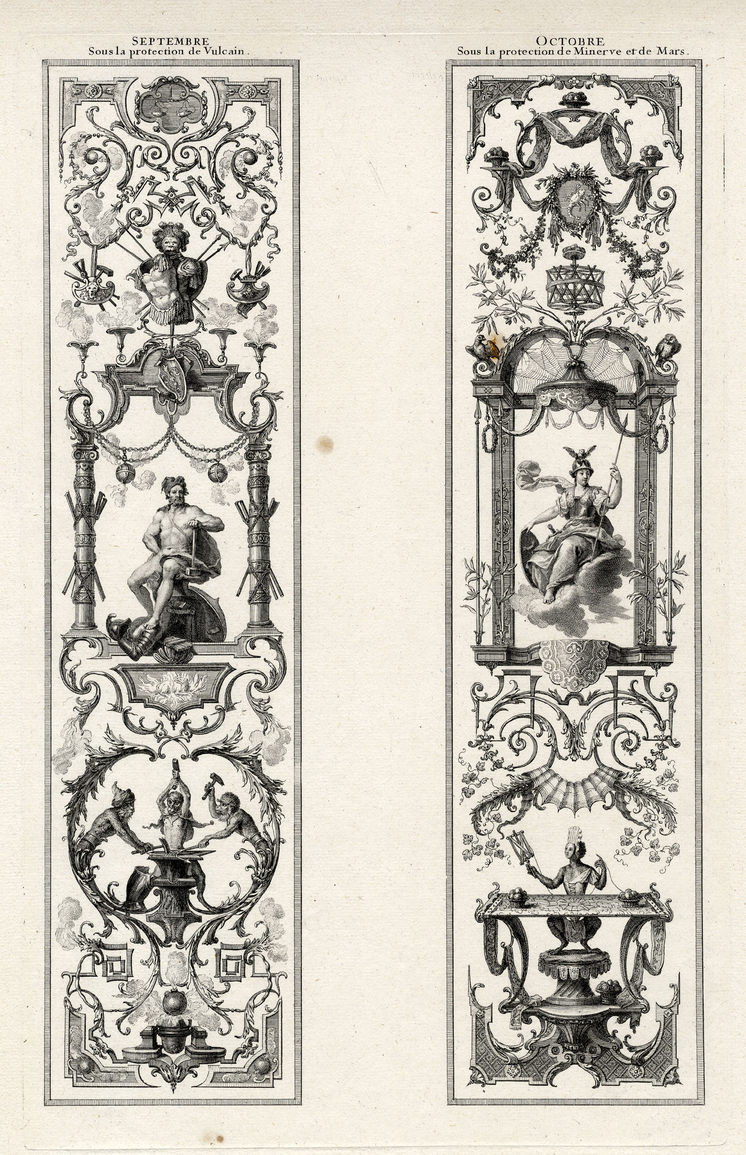 Blatt aus: Mois grotesques par bandes (Monatsbilder, entworfen für die Gobelins im Schloss von Meudon); Kupferstichfolge, Anfang 18. Jh.